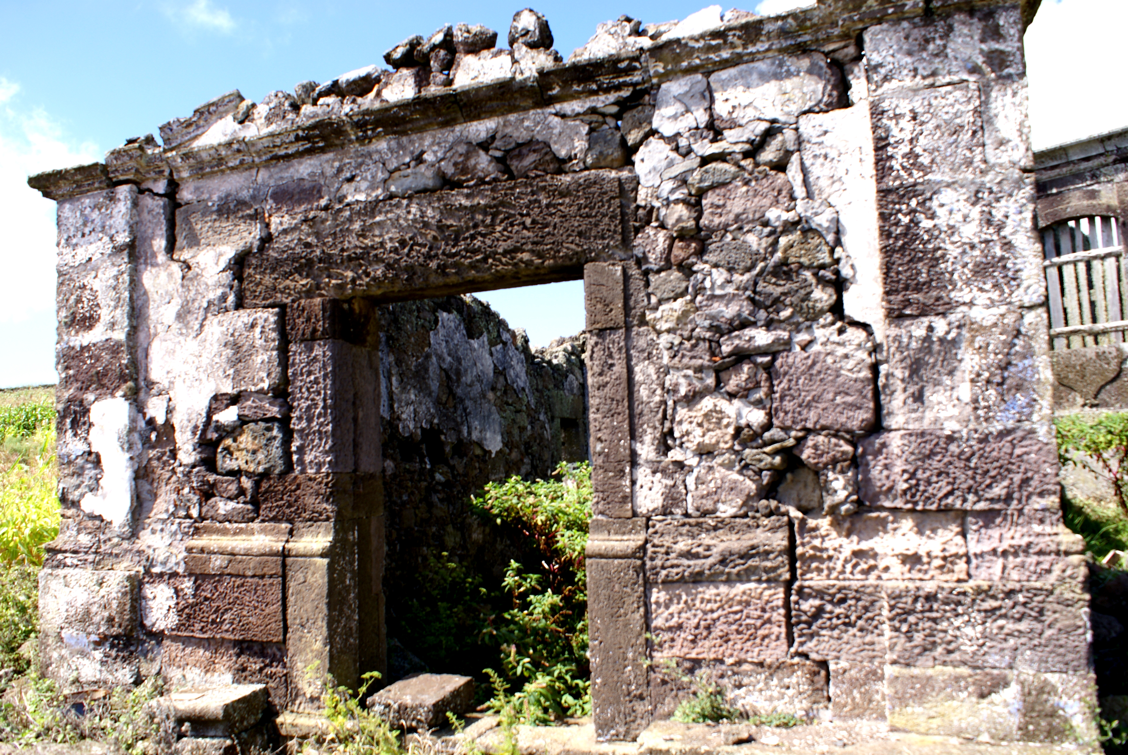 Solar dos Tiagos, ruínas da capela, porta, Topo, Calheta, ilha de São Jorge, Açores